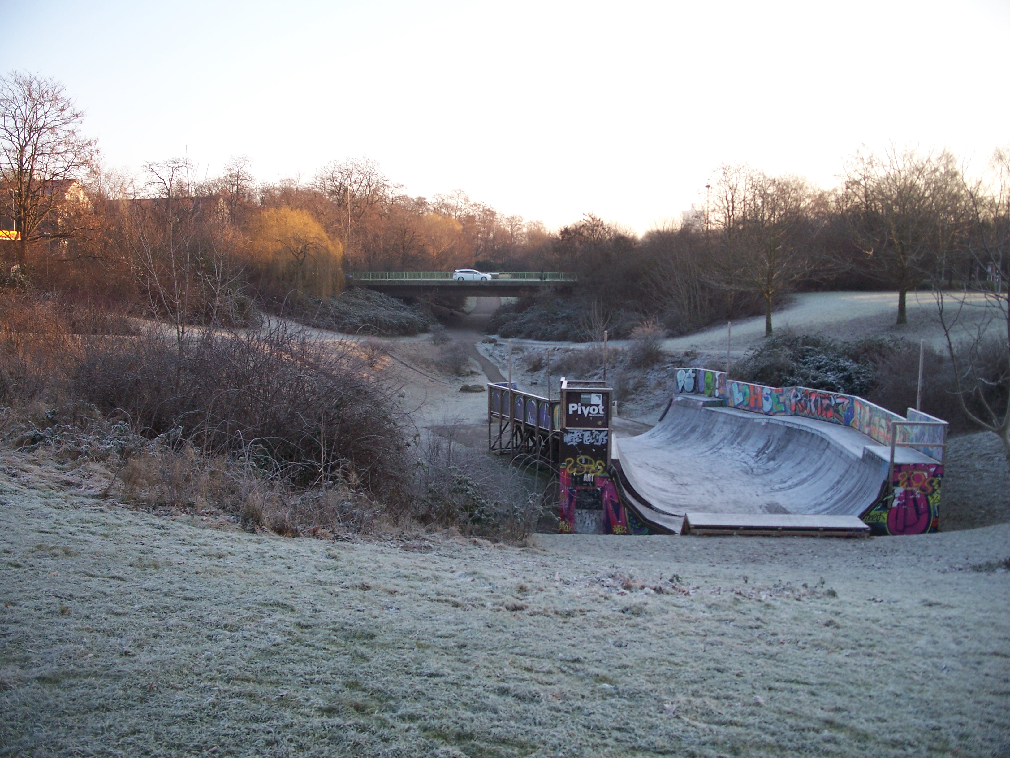 überbreite Fußgängerunterführung unter der Neusserstr.